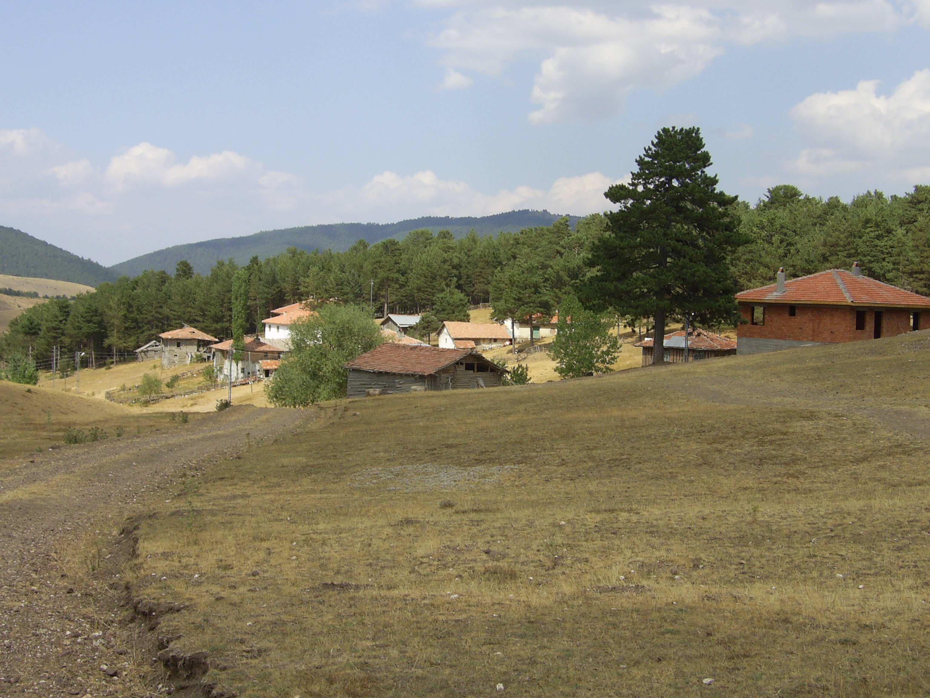 Kilkuyu, Tosya , Kastamonu